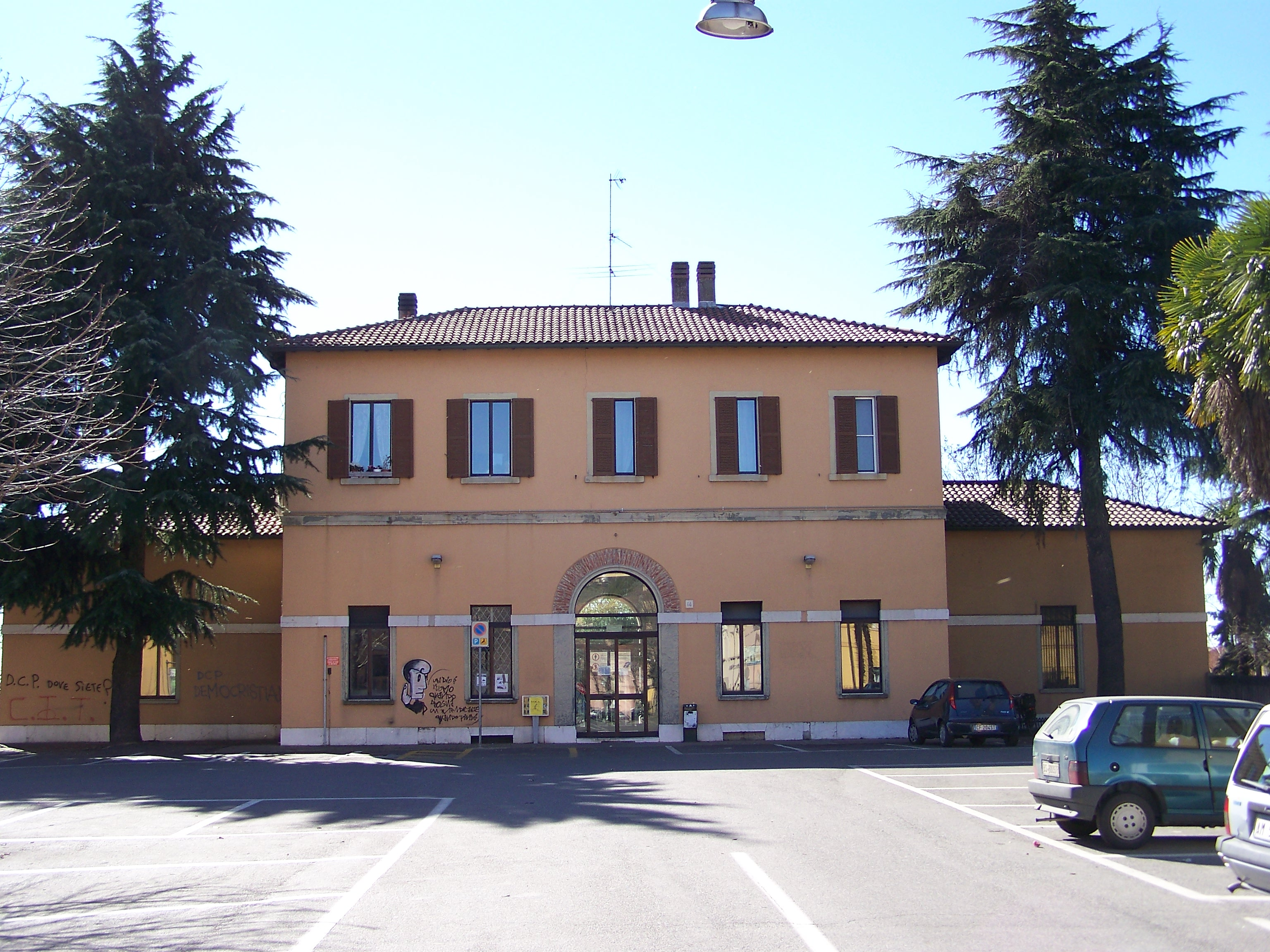 Lato paese della stazione ferroviaria di Coccaglio